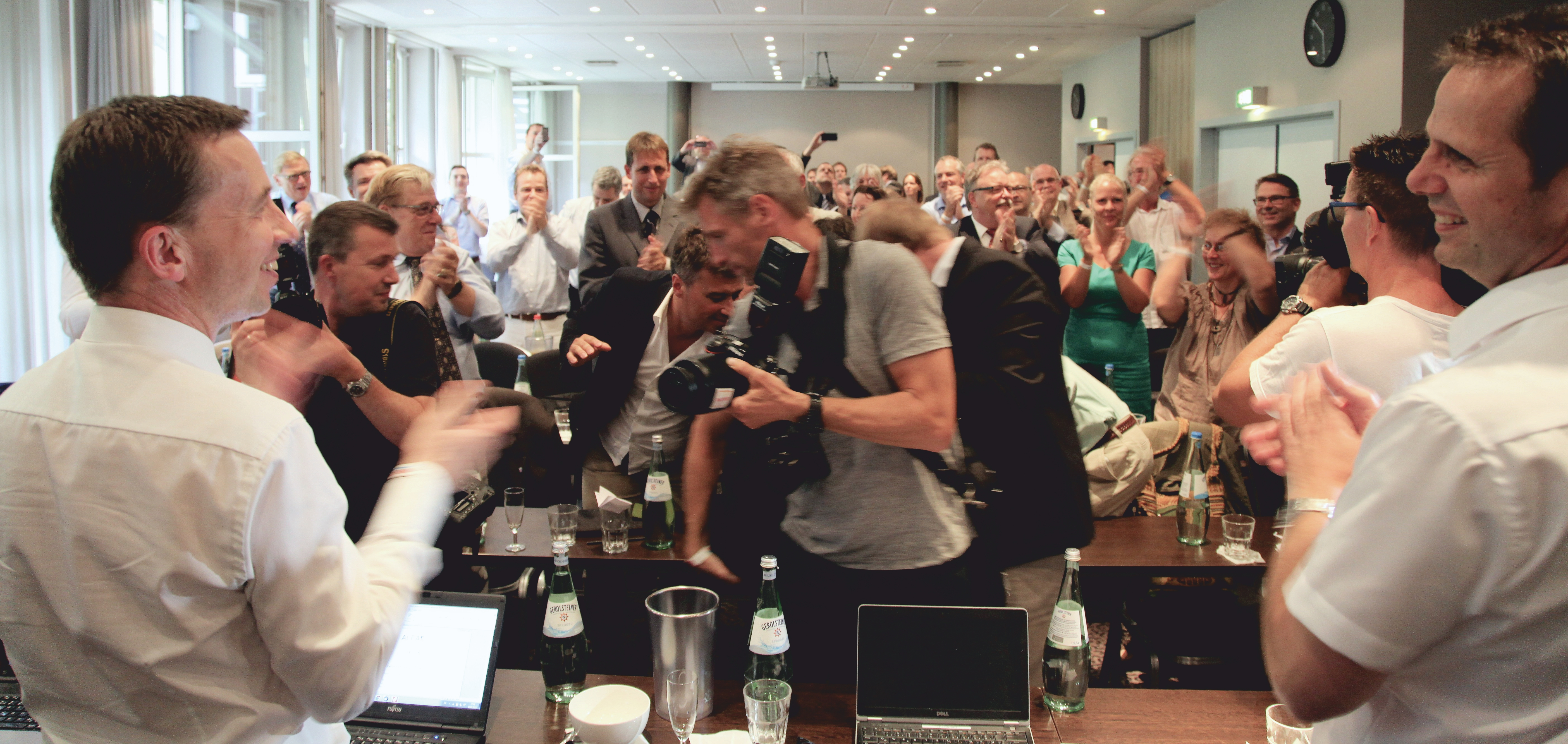 Gründungsversammlung der Partei ALFA in Kassel, Bernd Lucke, Bernd Kölmel, ALFA, 19.7.2015